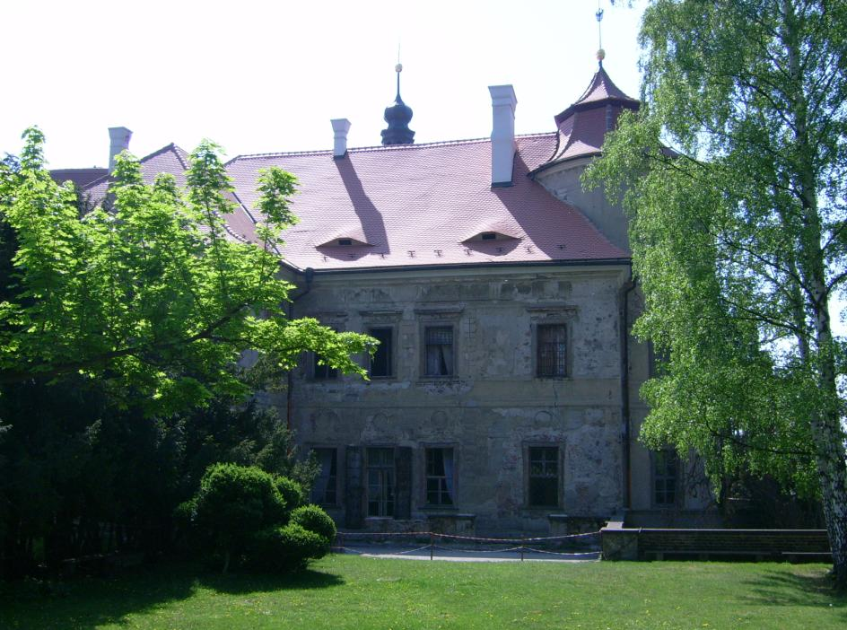 Severní průčelí zámku.